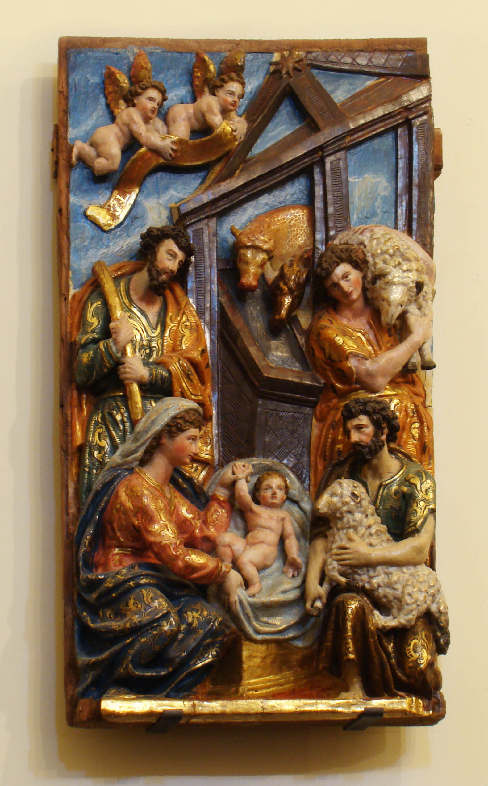 Iglesia de la Asunción en la localidad de Castrillo de Duero, provincia de Valladolid, España. Relieve de la Adoración de los pastores perteneciente al antiguo retablo mayor que se retiró tras la restauración de la iglesia, para dejar al descubierto las pinturas. Los relieves están documentados como obra del escultor de Cuellar Roque Muñoz, ejecutada entre 1602 y 1605.